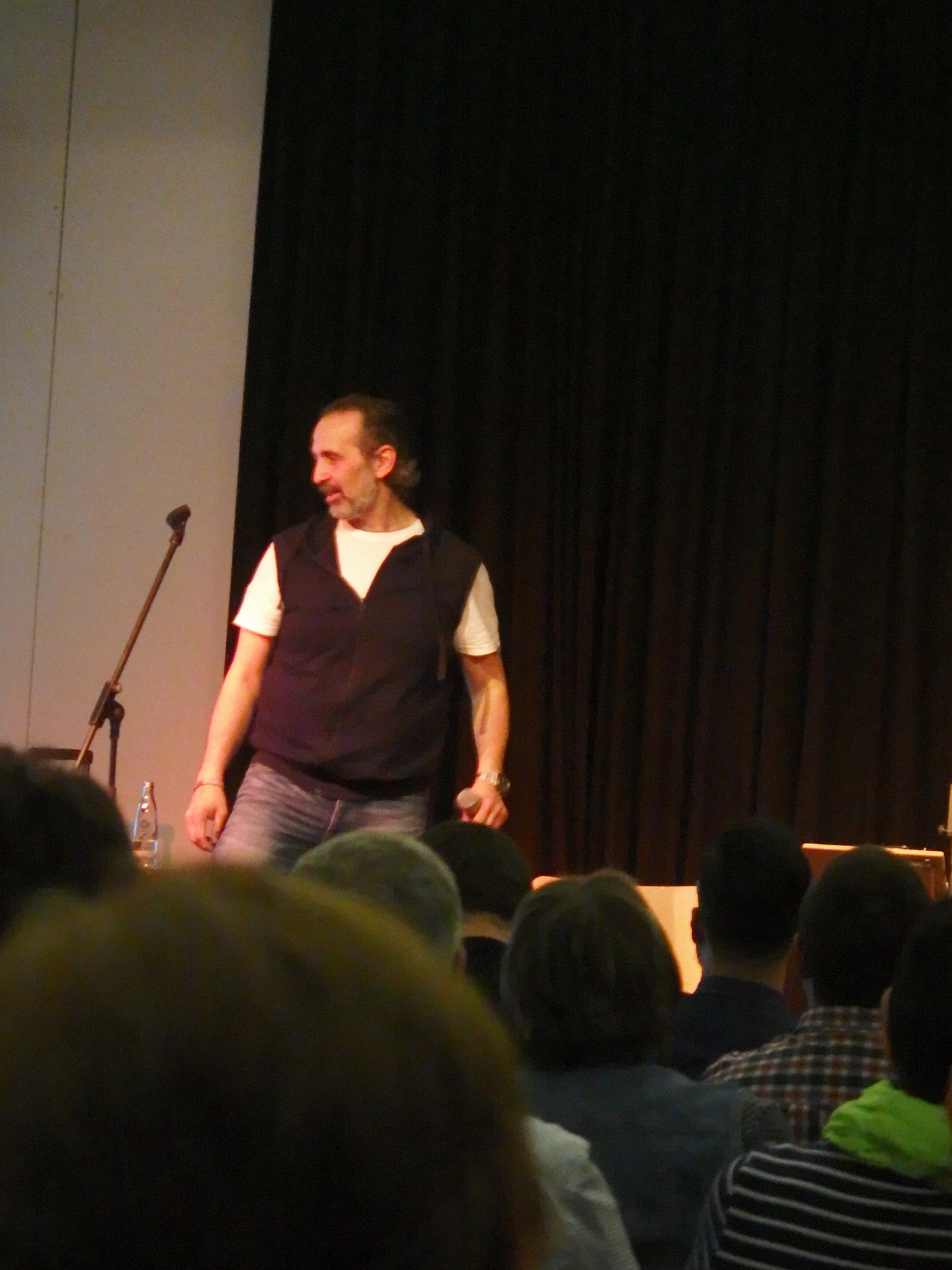 Esther Bejarano und Microphone Mafia im Bildungszentrum Kirkel